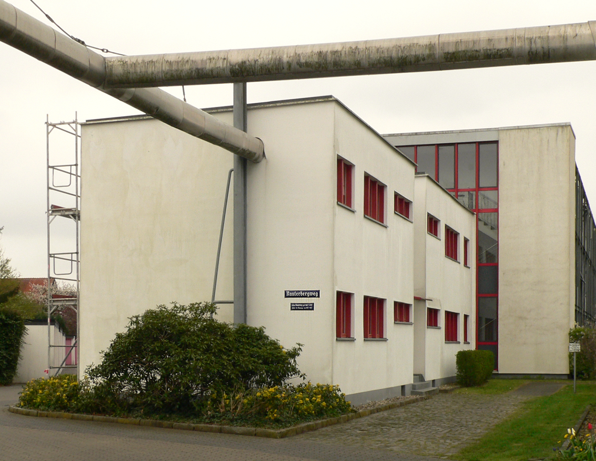 Siedlung Blumläger Feld in Celle mit abgestützten Fernwärmerohren, im Vordergrund der belassenen Teil der 220 Meter langen östlichen Wohnzeile, dahinter die 2003 verbreiterte und erhöhte Wohnzeile